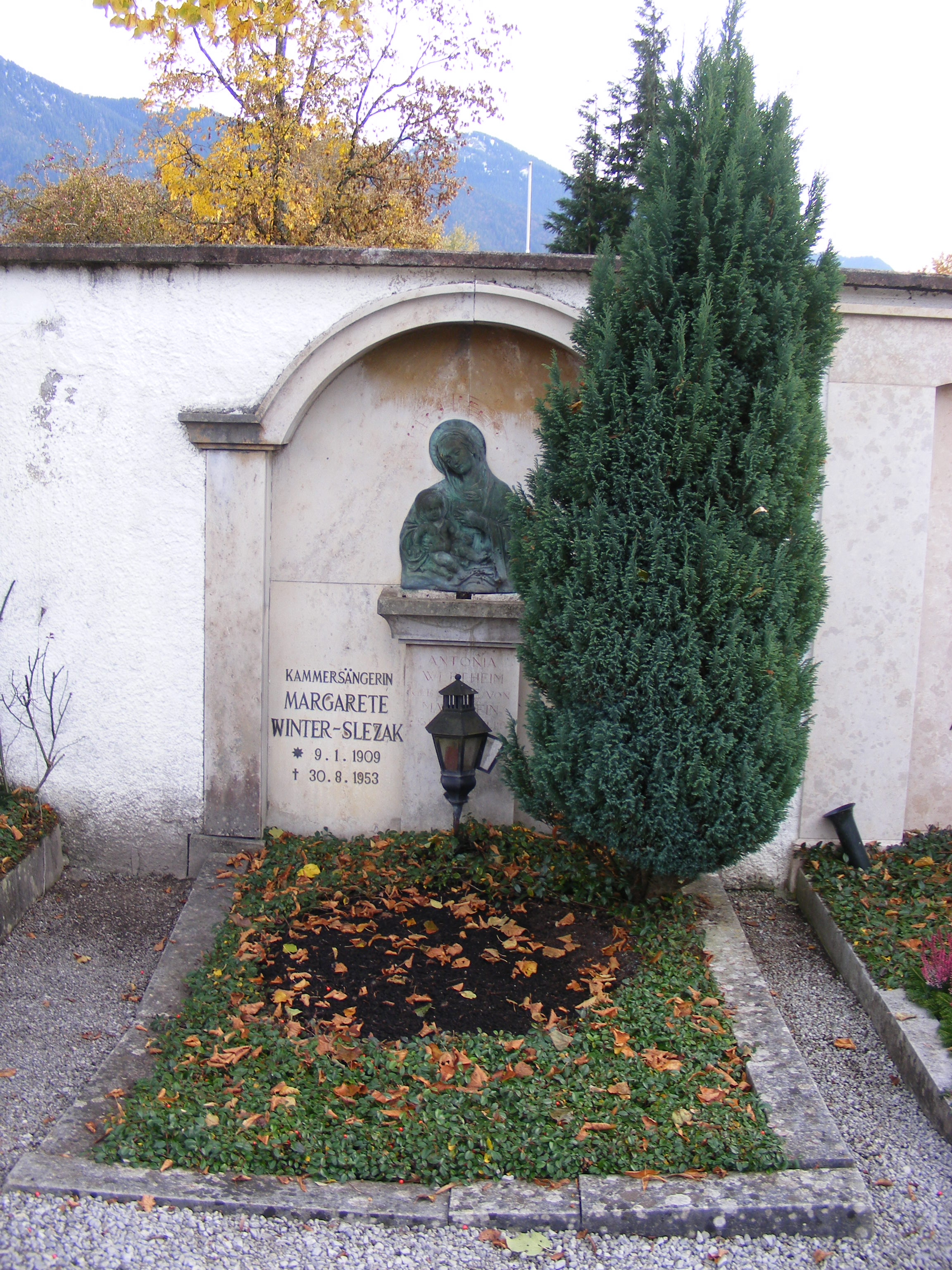 Rottach-Egern - Friedhof St. Lorenz - Grabstätte Kammersängerin Margarete Winter-Slezak (Rottach-Egern, OT Egern, Bayern).